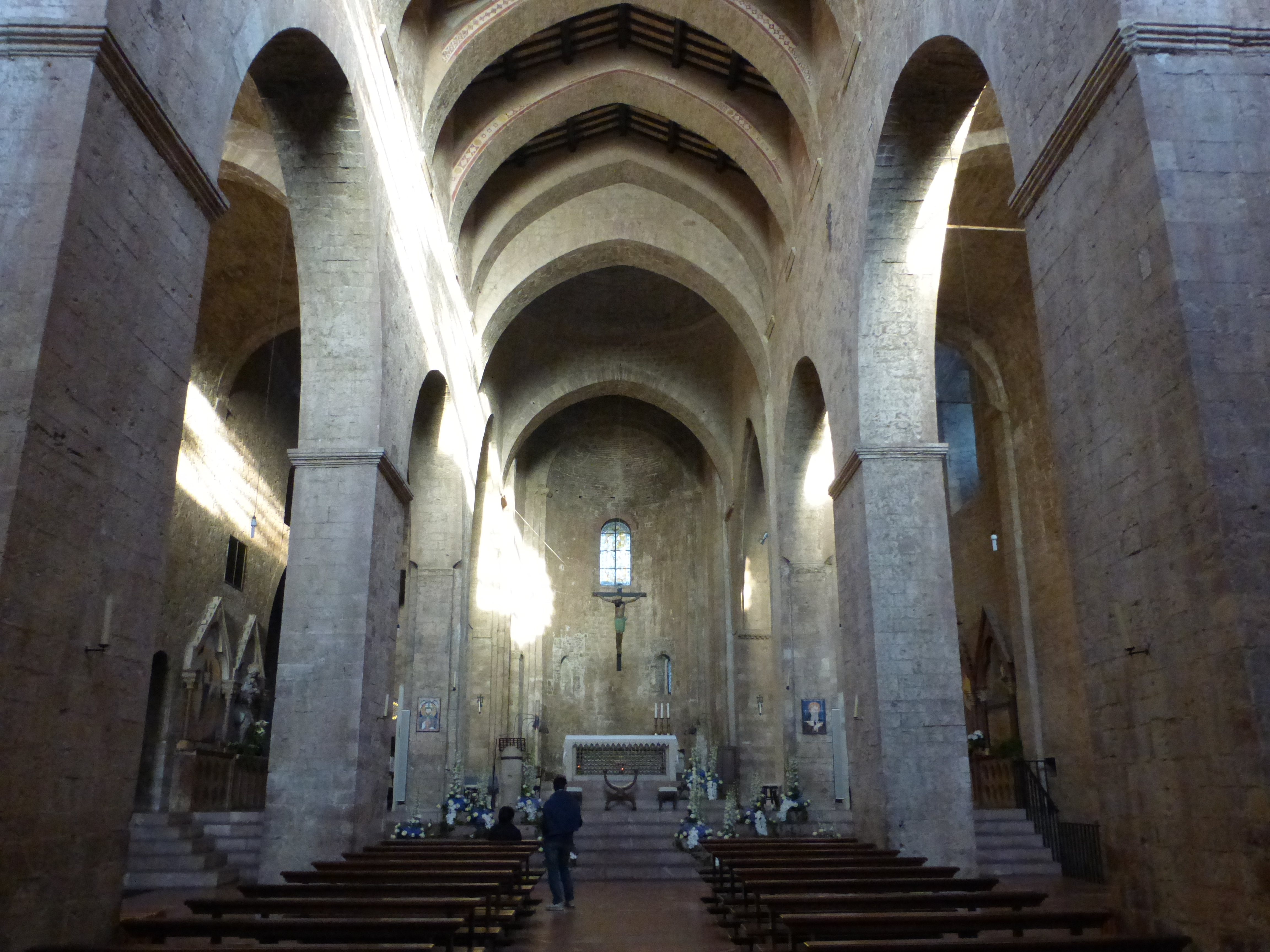 Interno della chiesa di San Pietro, Assisi, Perugia